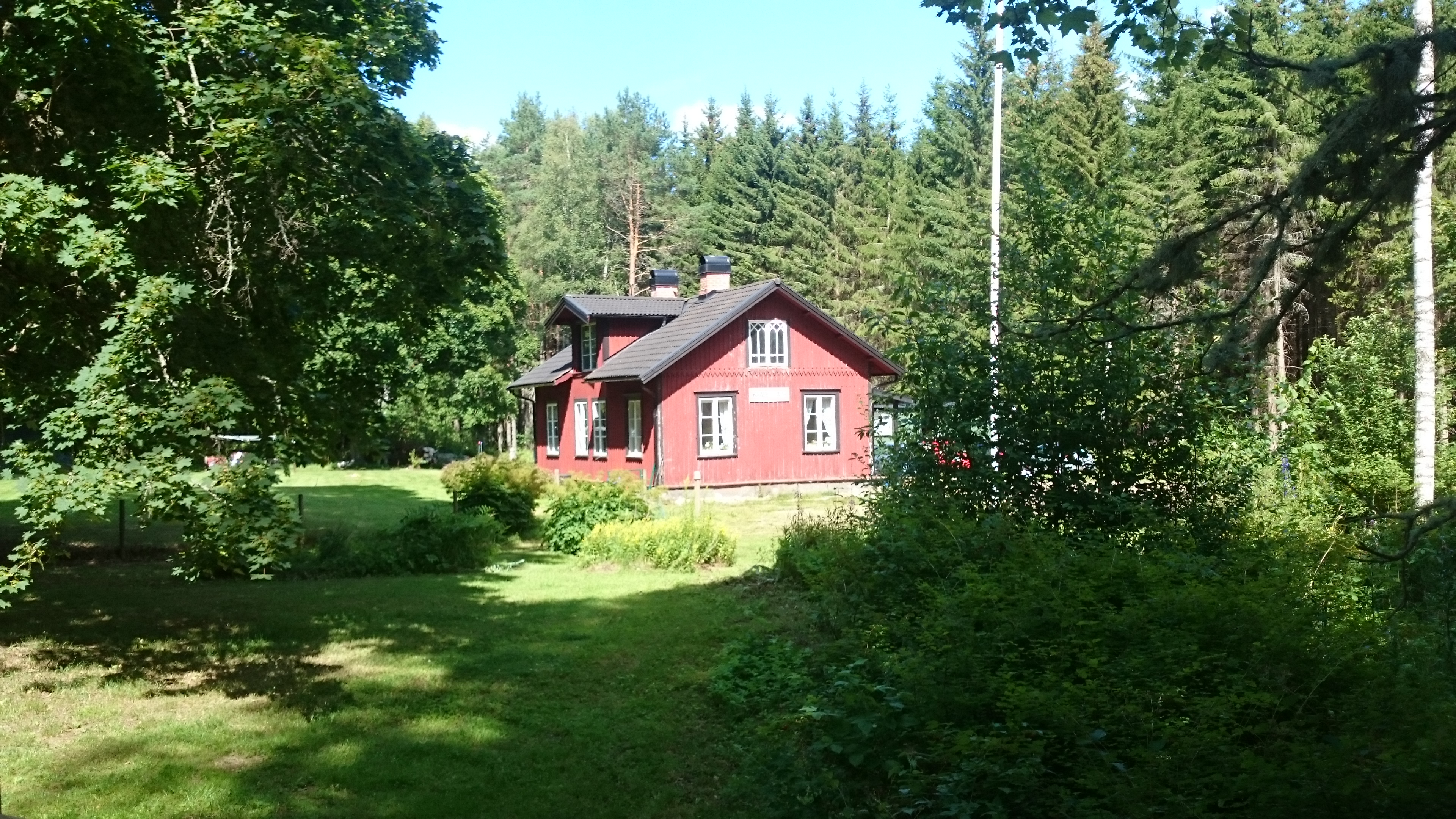 kavlås station